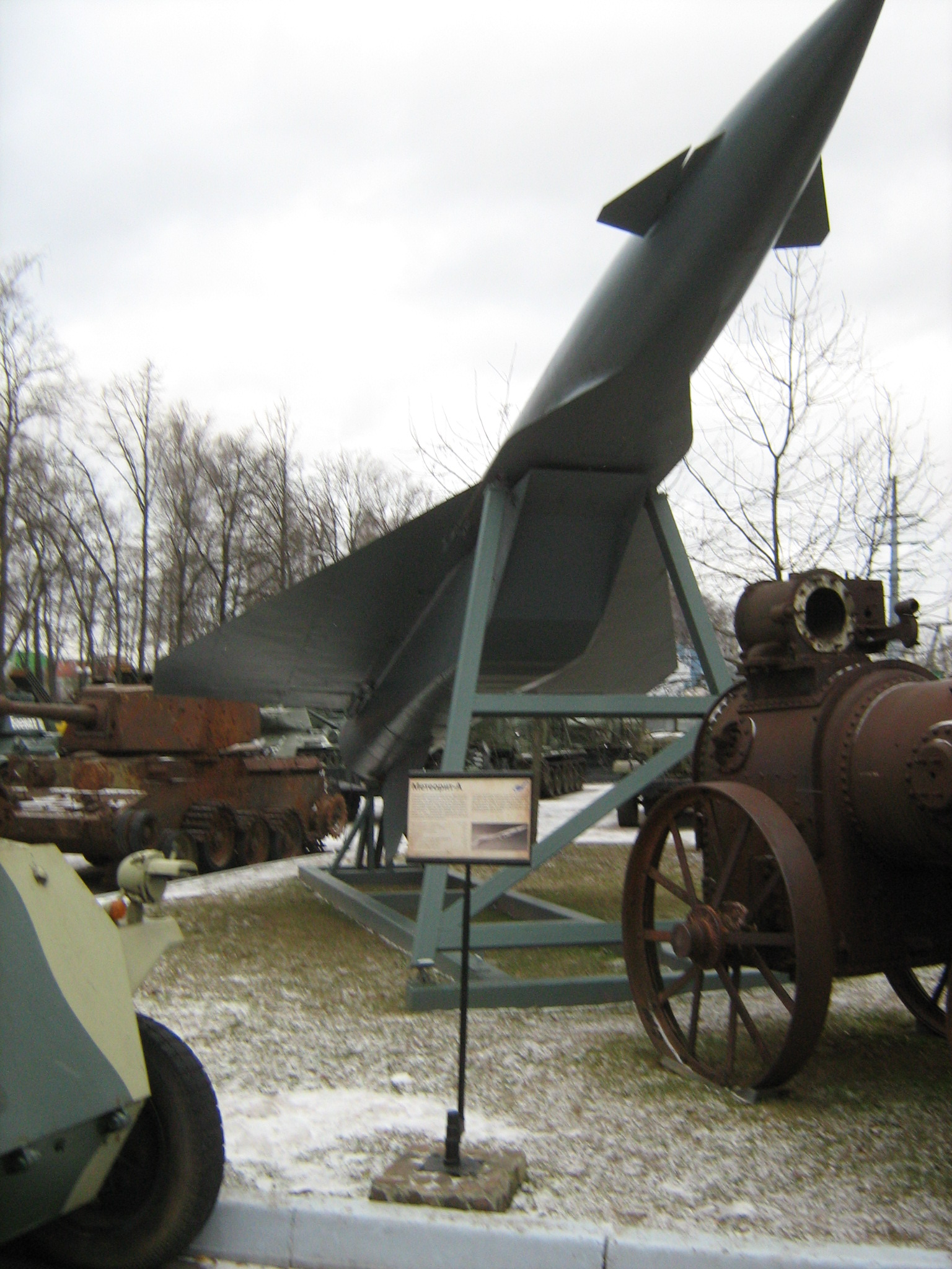 Крылатая ракета 3М25 Метеорит-А